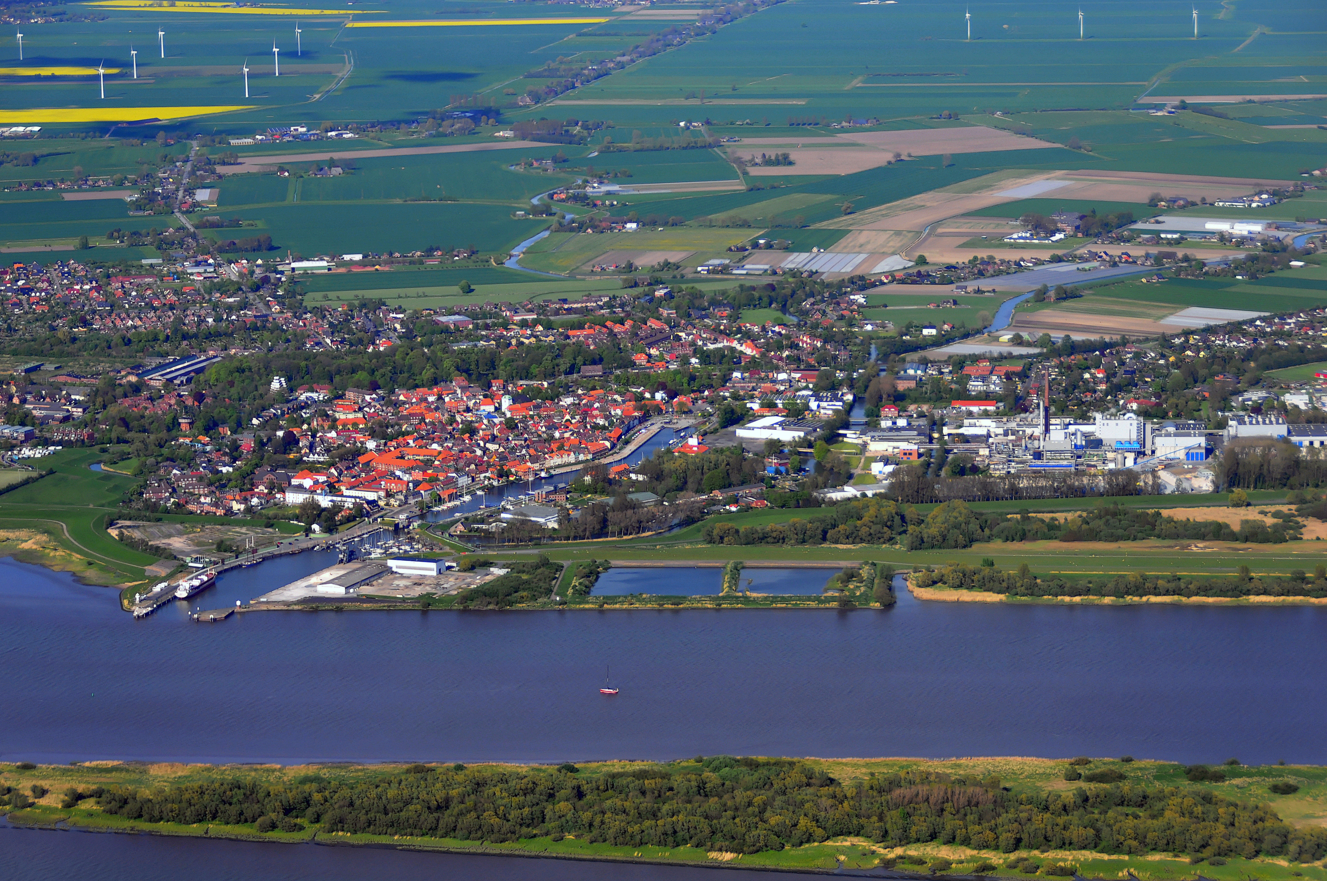 Luftbilder von der Nordseeküste 2012-05